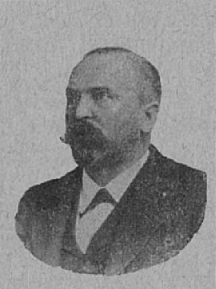 Edvard Parma (1853-1921), rakouský právník a politik z Moravy; poslanec Moravského zemského sněmu